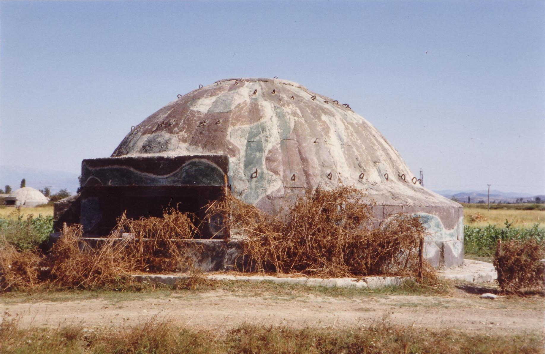 Bunker in Albanien, zu tausenden errichtet in der kommunistischen Zeit. (Selbst fotografiert - GNU-Lizenz)